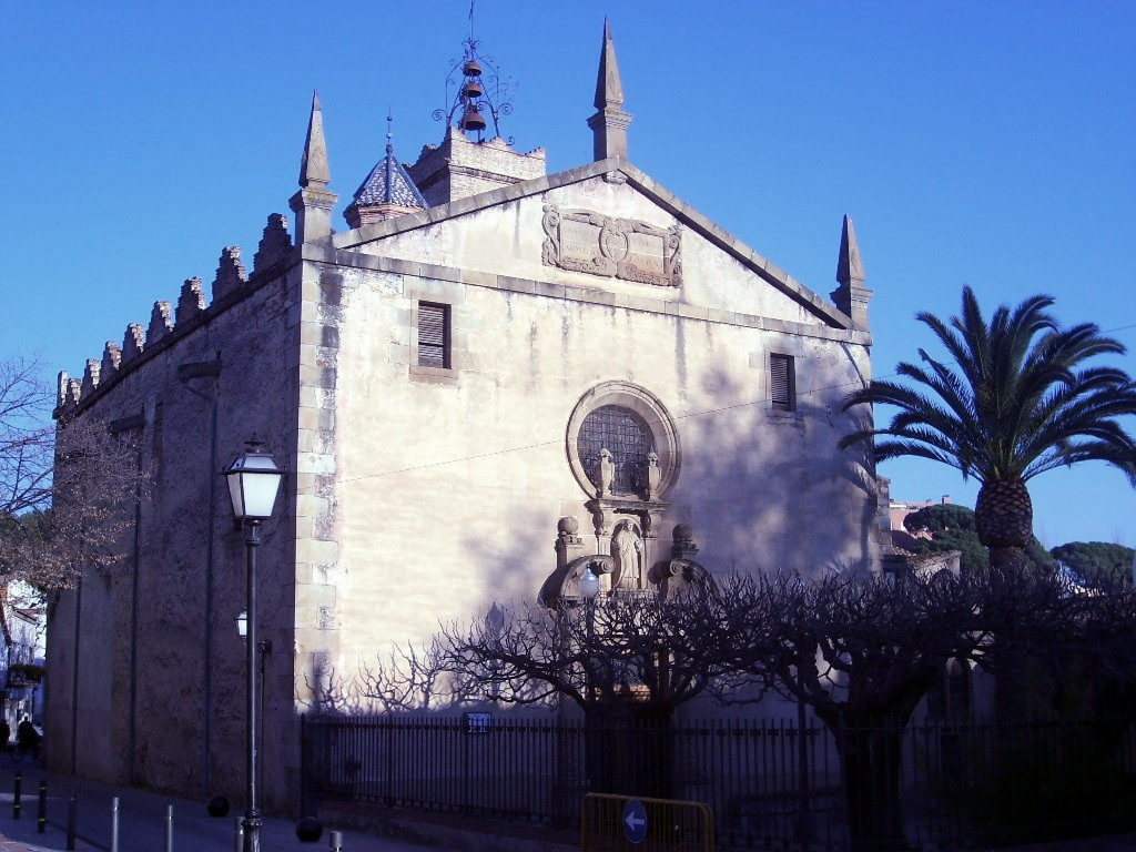 Església de Sant Feliu. Alella (Maresme)